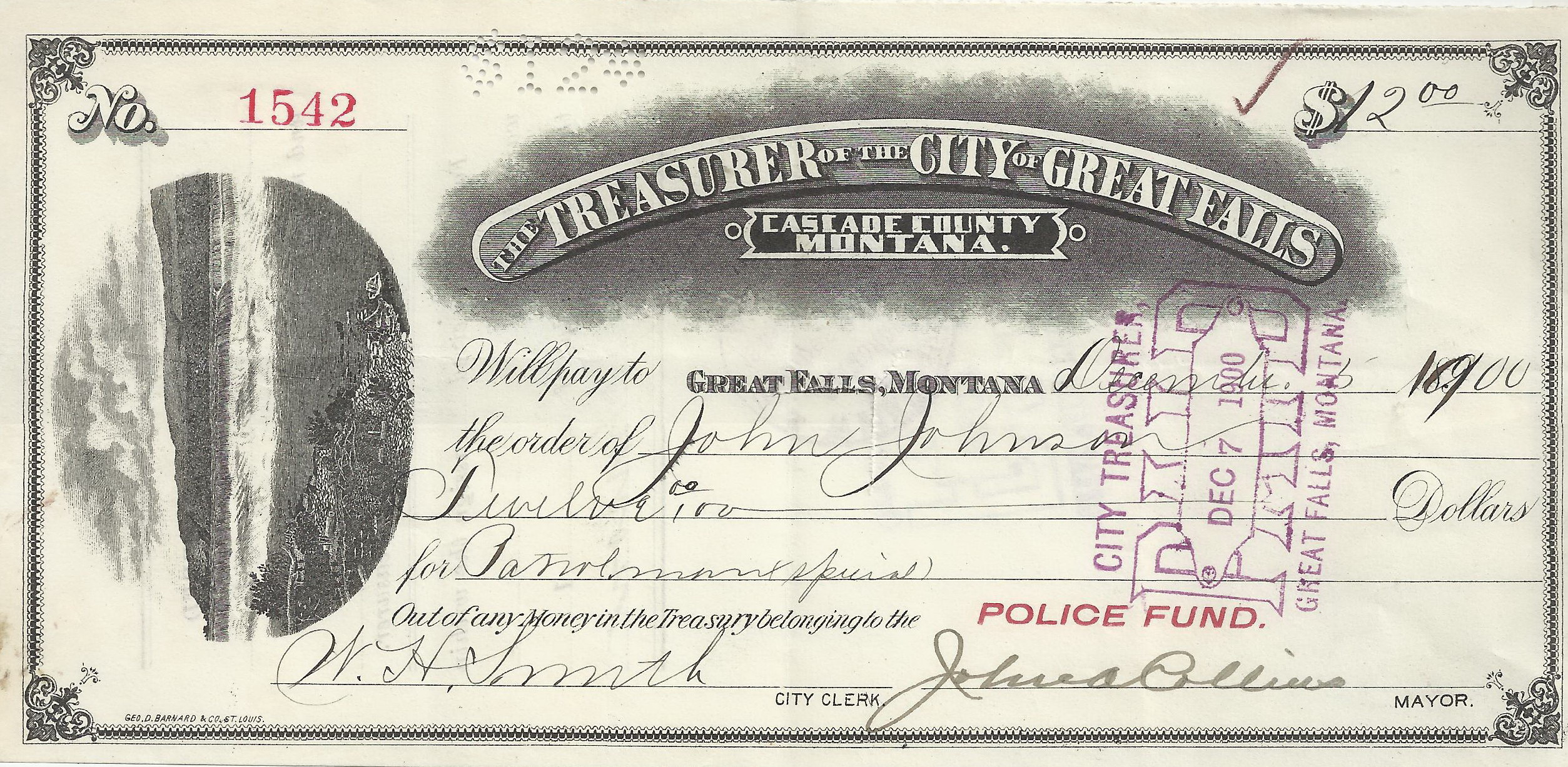 De foto toont een betalingsoverdracht uit 1900, waarbij voor de veiligheid gebruik is gemaakt van een checkponsmachine, zodat de ontvanger bijv. niet van cijfer 1 een cijfer 7 kan maken. De controleur schrijft dan het handgeschreven bedrag handmatig door middel van een checkponsmachine over in de vorm van gaatjes (op deze check, rechts naast het Nr.1542).